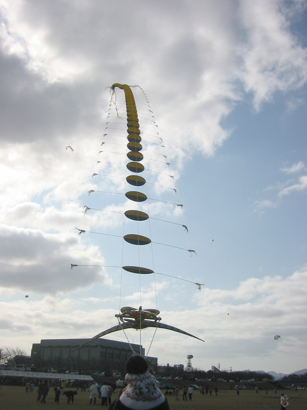 童謡の里龍野凧あげ祭り